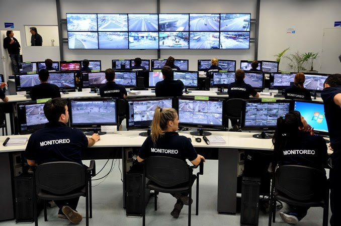 Centro de Monitoreo de Seguridad Lomas.